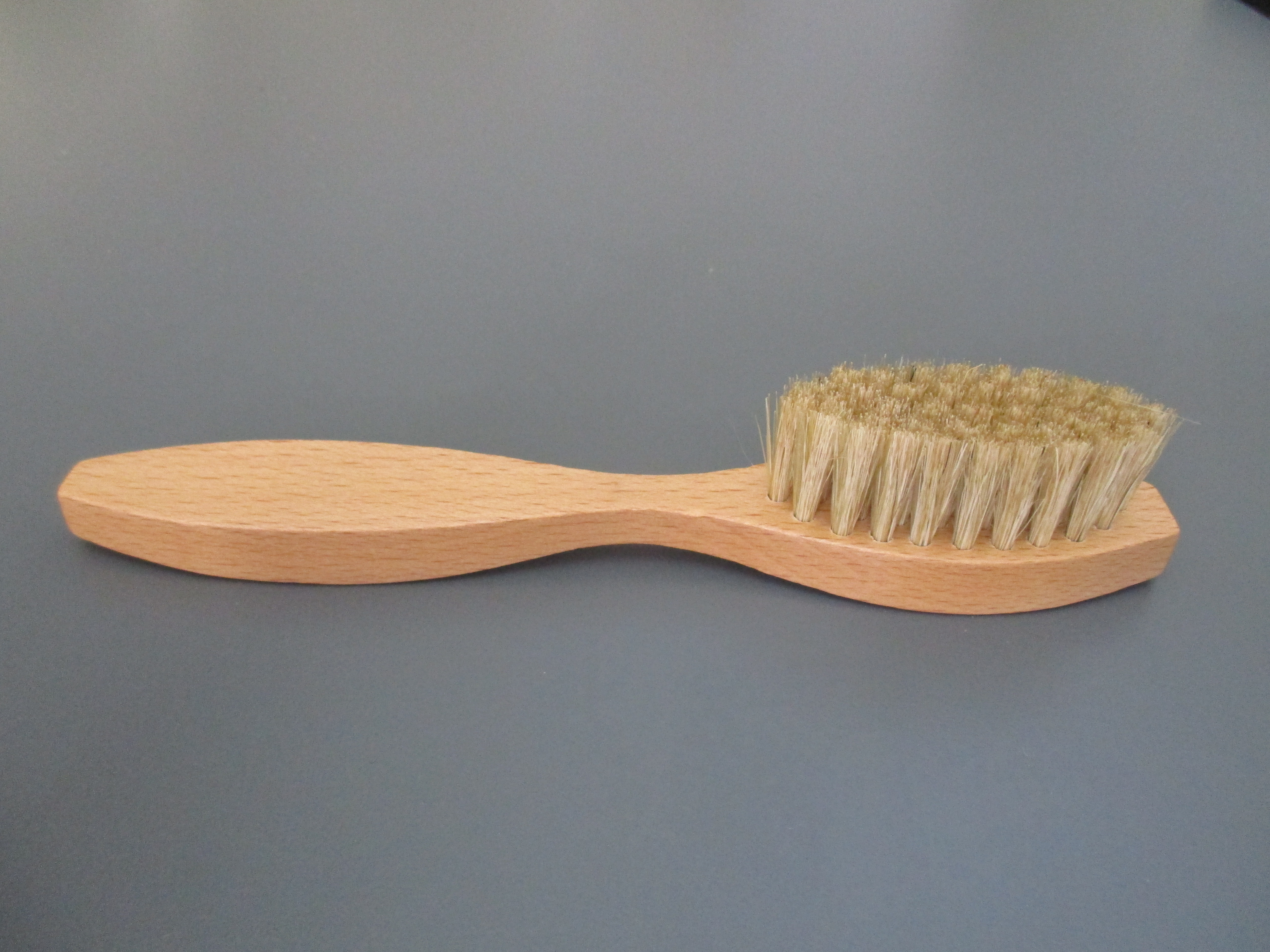 Brosse à chaussures en hêtre et soies de porcs dite aussi brosse de cirage, applicateur, palot, pommadier, spatule